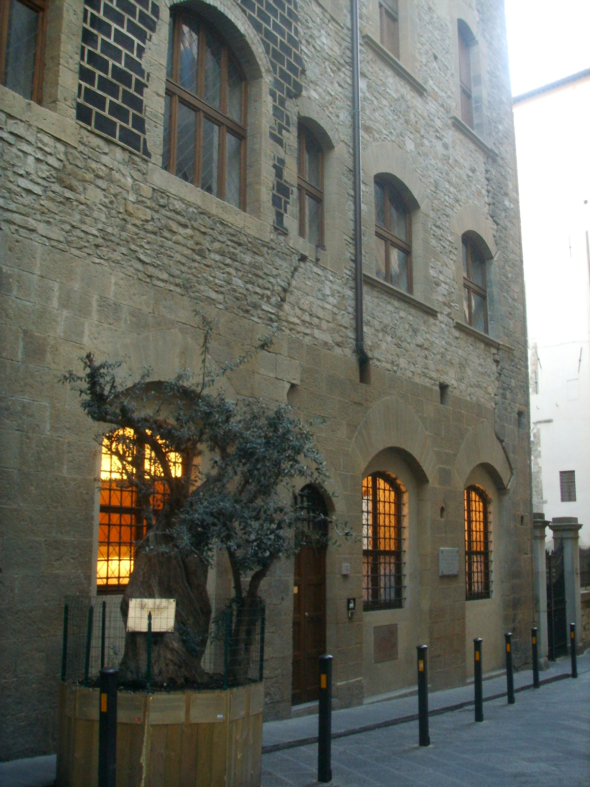 Via_dei_Georgofili in Florence, Italy